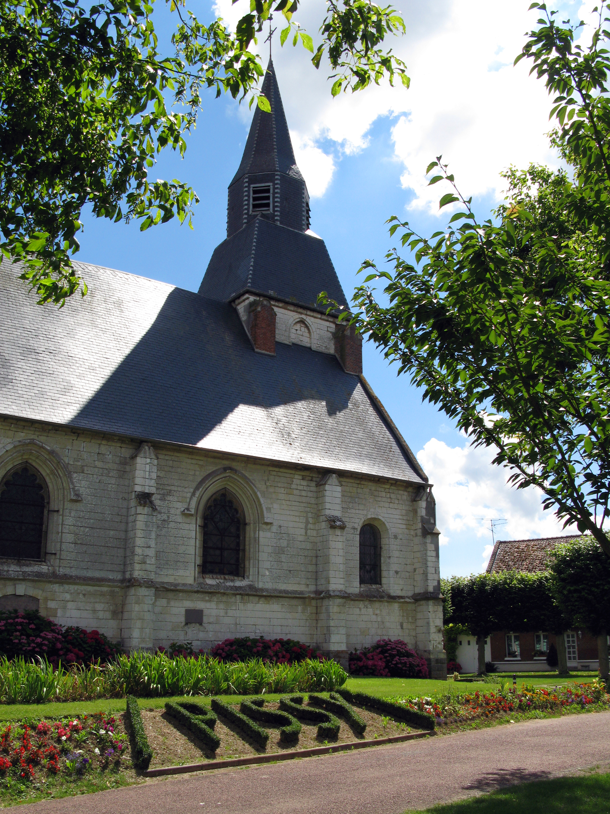 Pissy (Somme, France) - Église Saint-Fuscien.